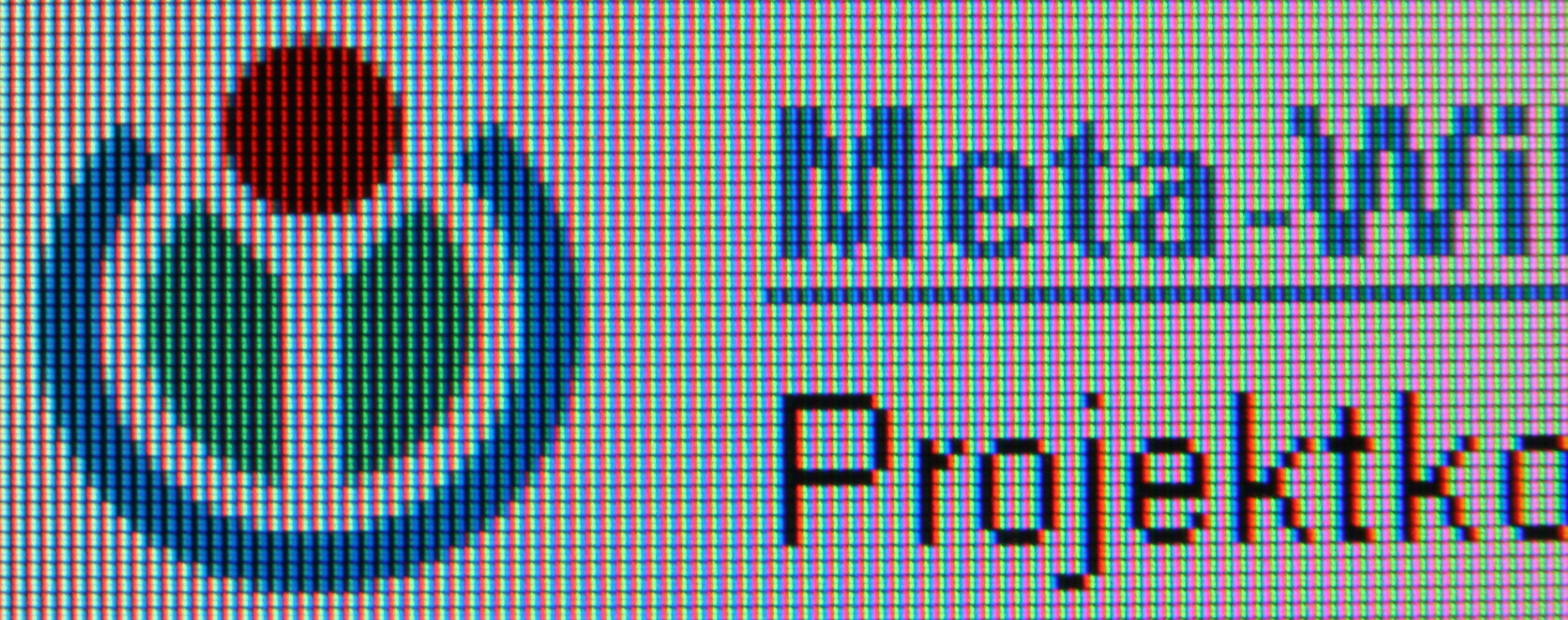 Das Bild zeigt Flüssigkristallzellen eines TFT Monitors (Medion). Das dargestellte Wiki-Logo zeigt, wie die Farben zusammengesetzt werden